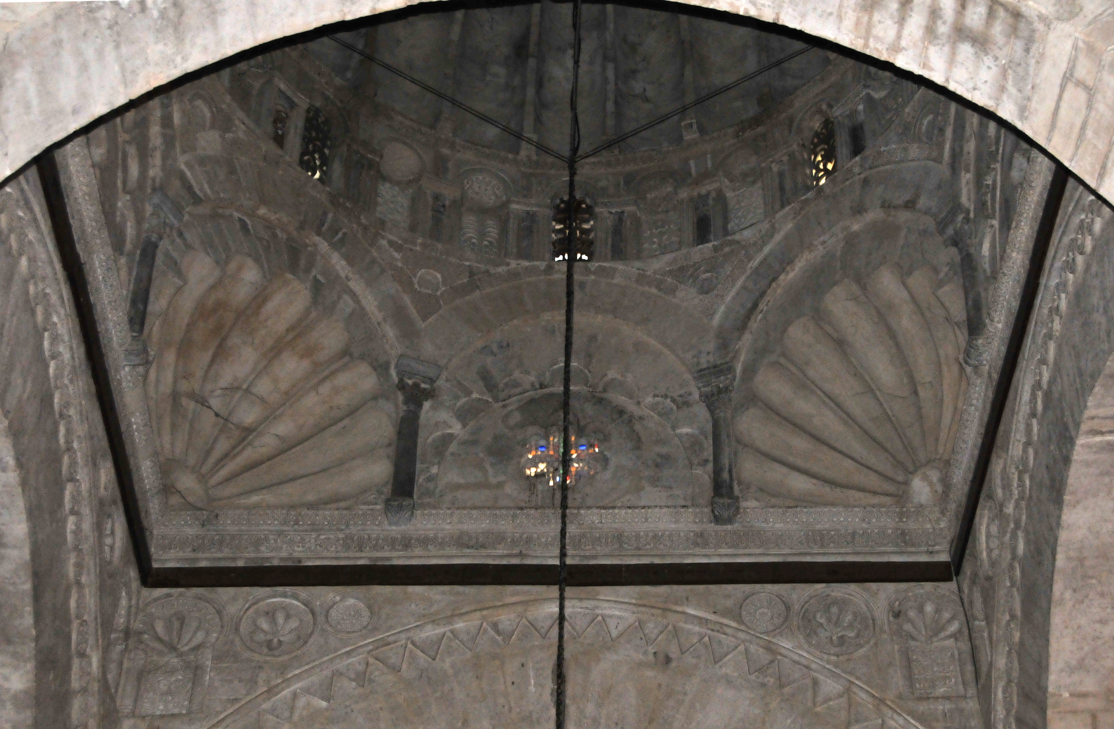 Vue intérieure de la coupole du mihrab dans la salle de prière de la Grande Mosquée de Kairouan, en Tunisie.